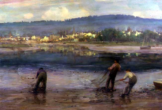 Kirkcudbright